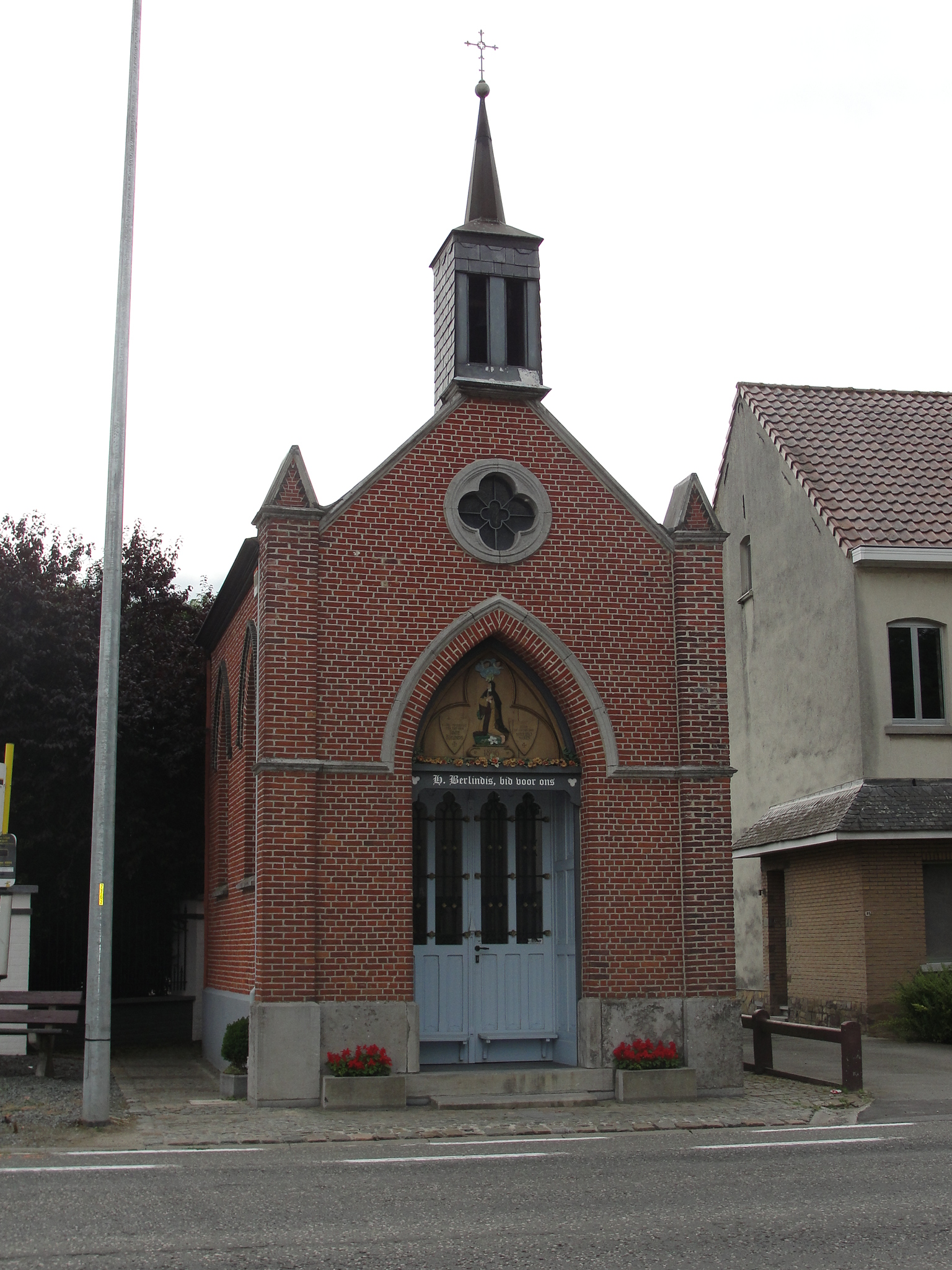 Berlindiskapel in Meerbeke langs de Hallebaan. Opgericht in 1866 in vroege neogotische stijl.